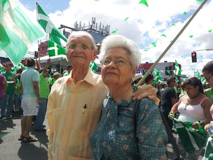 El Dr. Gonzalez y su esposa Georgina Rodriguez en el cierre de campana del PIP (2012)